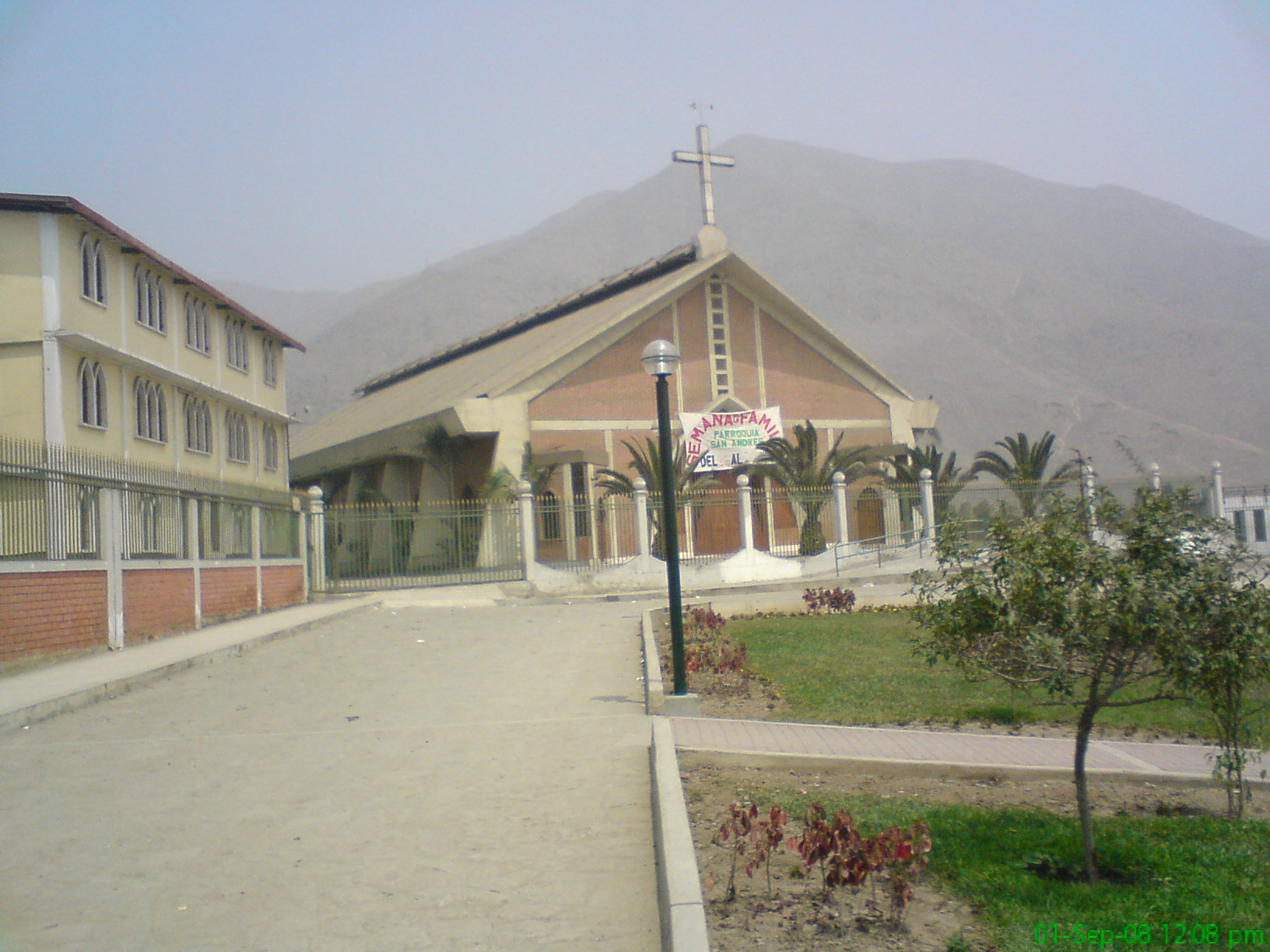 Catedral de Huaycan en Ate Lima